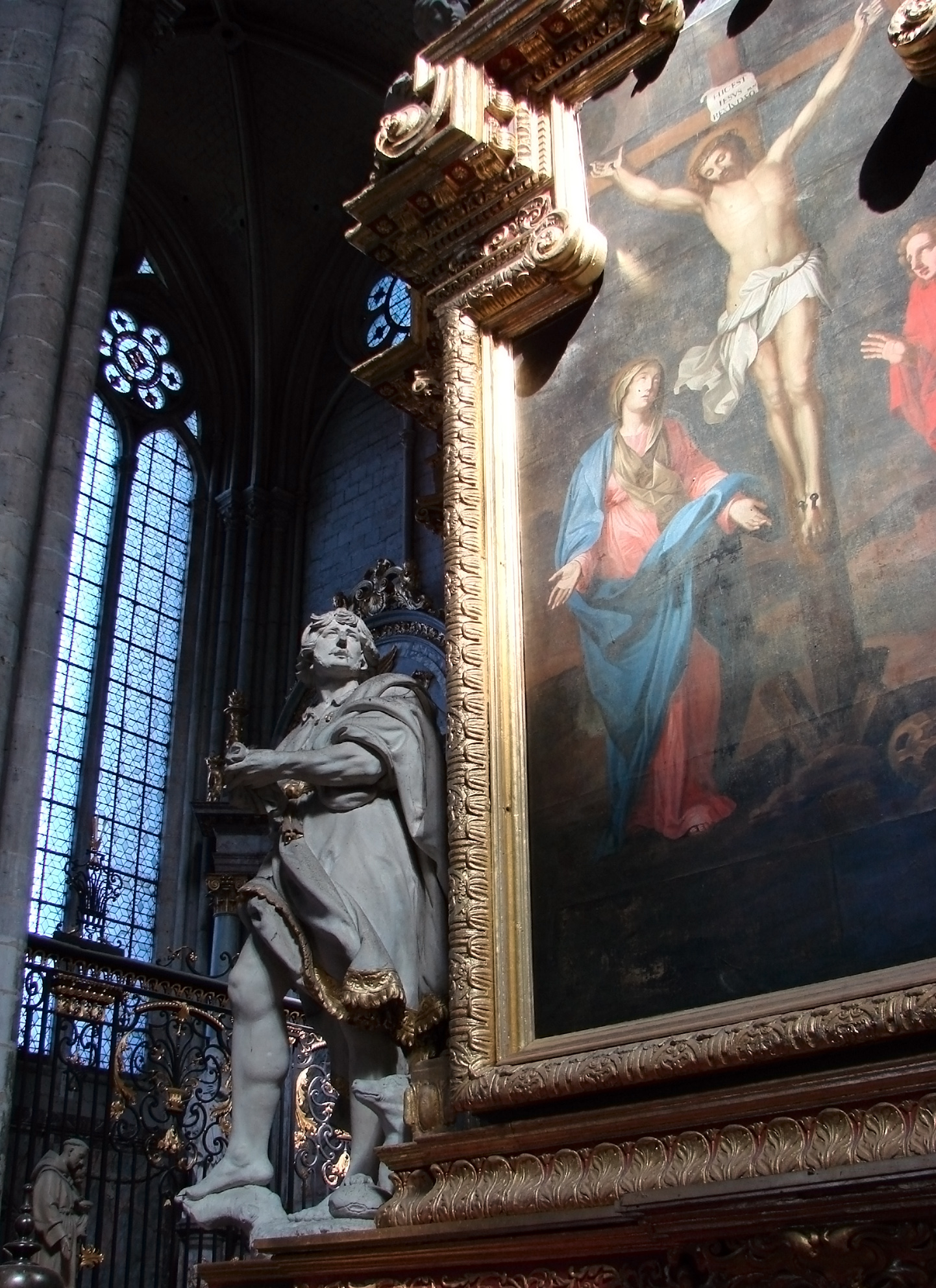 Statue de Saint Roch par Nicolas Blasset (1634), ornant la chapelle Saint-Sébastien dans la cathédrale d'Amiens. Le tableau est une Crucifixion, provenant du couvent des Fontevristes de Moreaucourt, et attribué au peintre flamand Guillaume Hergosse (18ème siècle).